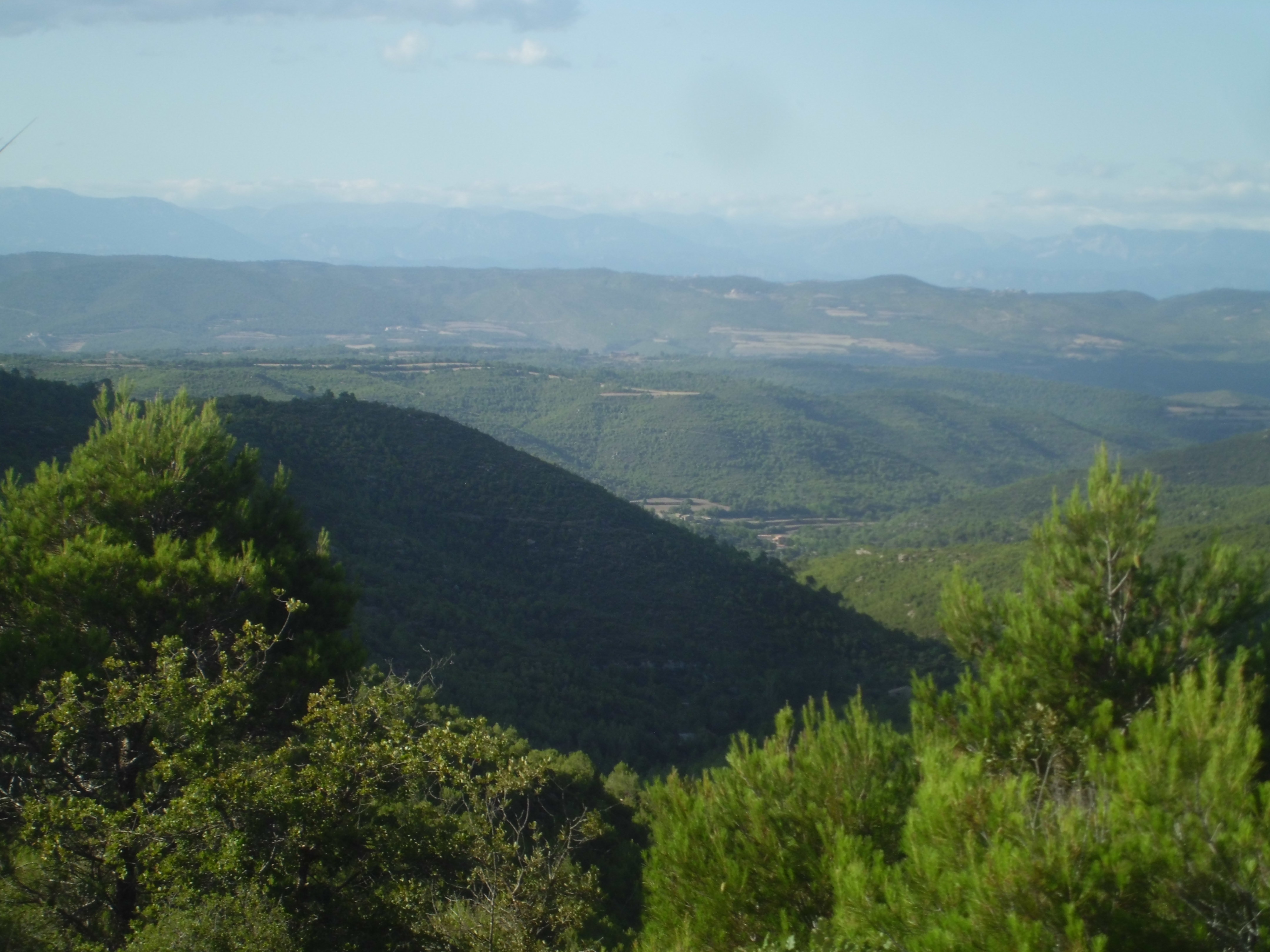 Una de les valls de la Serra de Rubió.